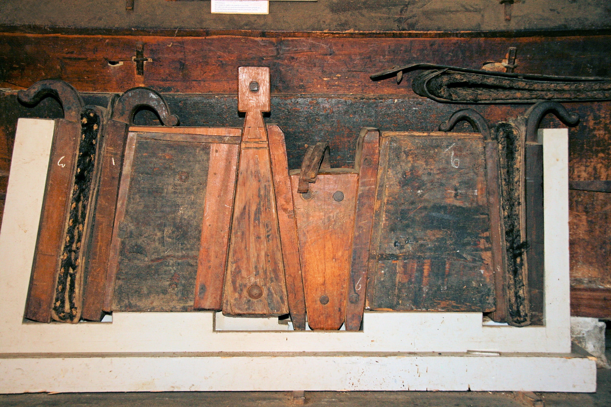 Koog aan de Zaan: oliemolen Het Pink: doorsnede stamp- en heiwerk